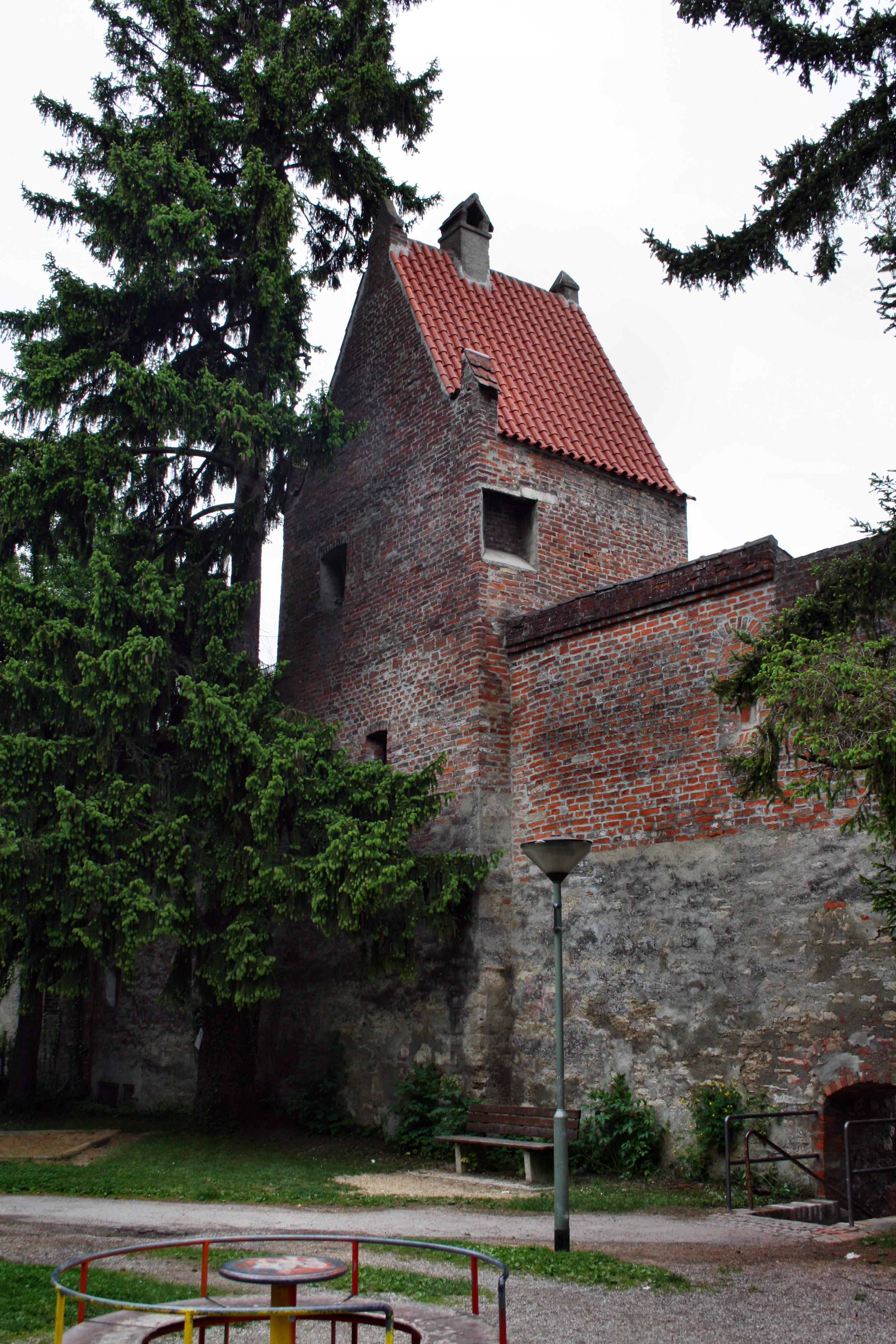 Der Soldatenturm aus dem 14. Jahrhundert an der Hohen Wacht / Kaisergraben